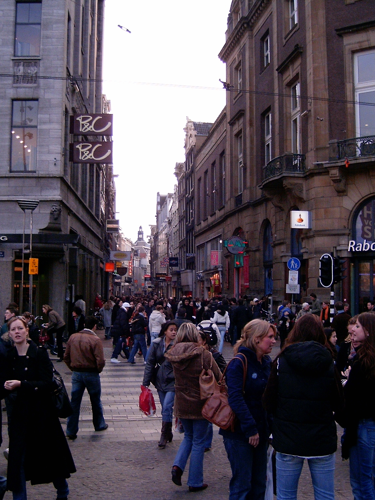 Noord ingang van de Kalvertstraat